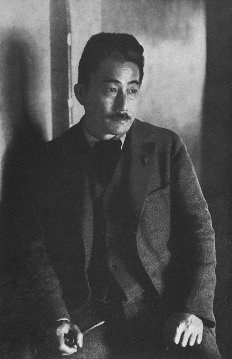 Portrait of Osanai Kaoru (小山内薫, 1881 – 1928)